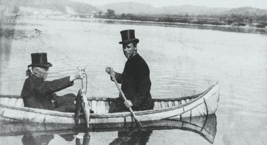 Canot d'écorce de bouleau - 1900, à la Rivière-aux-Rats, le long du St.-Maurice, Monseigneur François-Xavier Cloutier (1848-1934), 3e évêque de Trois-Rivières, l'abbé Paul Lamy, pipe au bec, aviron à la main